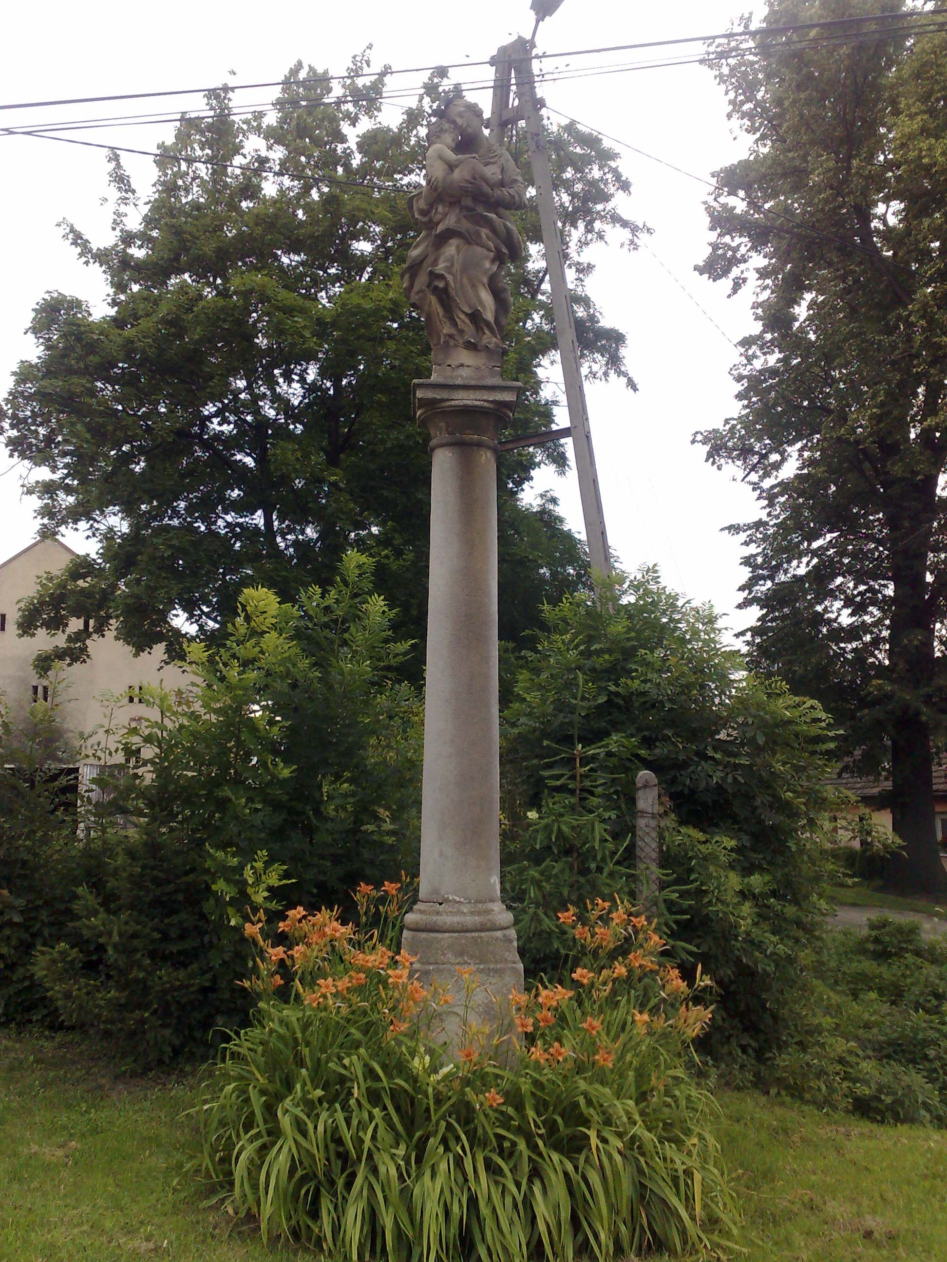 foto kpt. Tomek Nysa 2012